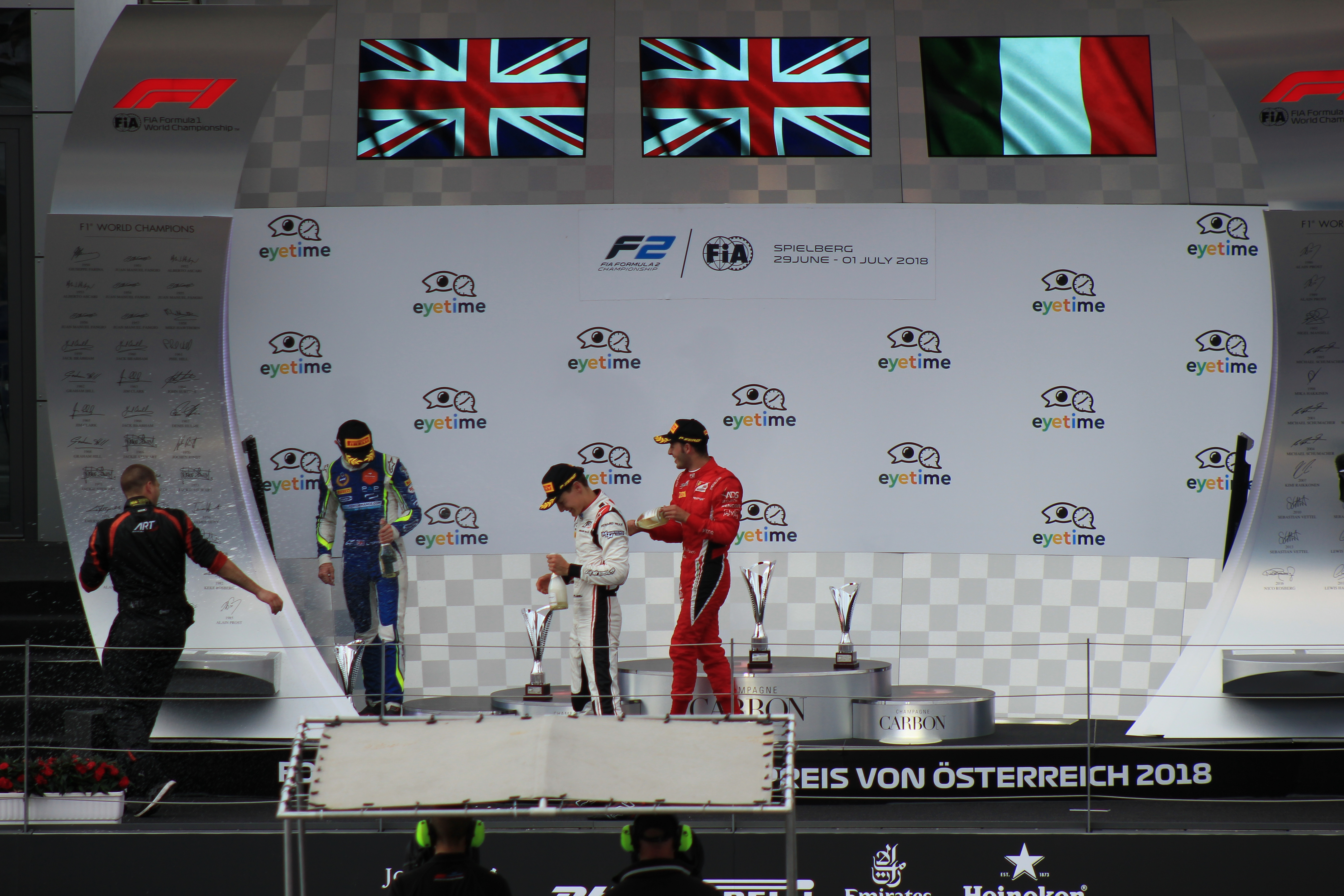 Das Podest nach dem ersten Rennen in Spielberg 2018